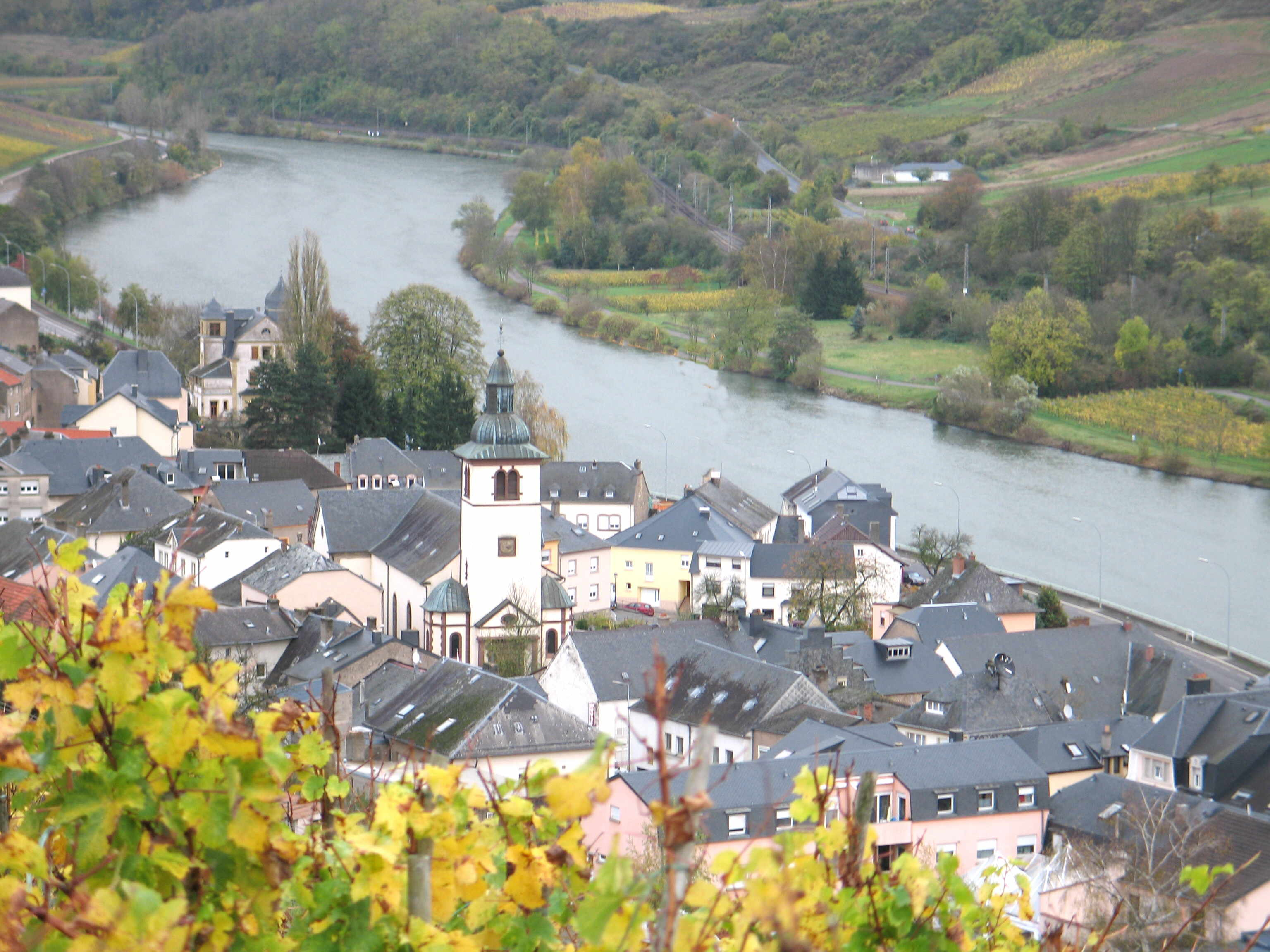 Le village de Wormeldange (Luxembourg)